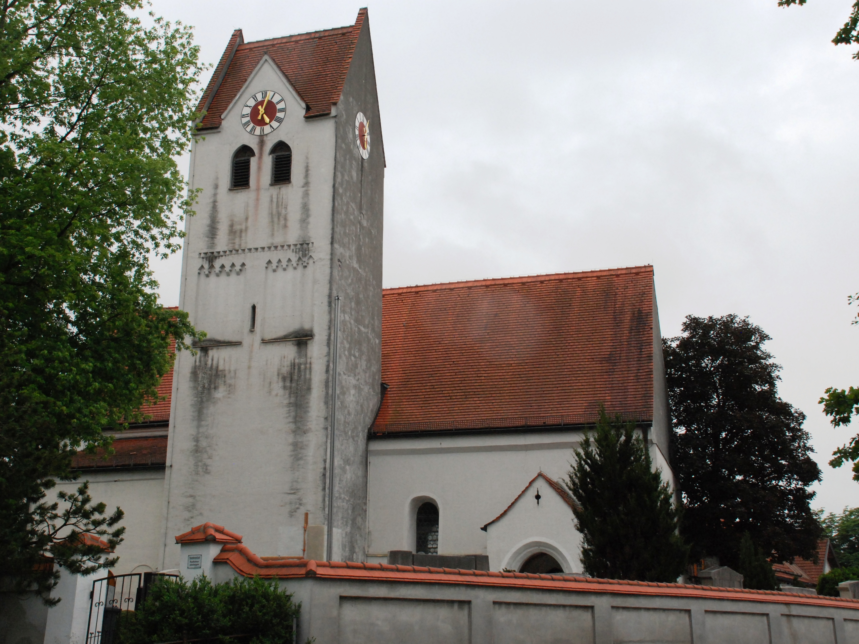 Katholische Kirche St. Nikolaus in der Gautinger Straße 9 in der Gemeinde Neuried, Landkreis München, Bezirk Oberbayern, Bayern. Erstmals erbaut wohl 1454, erneuert 1752. Als Baudenkmal unter Aktennummer D-1-84-132-2 in der Bayerischen Denkmalliste aufgeführt. Foto gemäß den Voraussetzungen zur Panoramafreiheit von öffentlicher Verkehrsfläche aus aufgenommen.